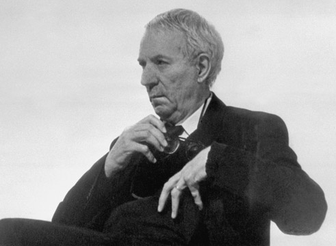 Úplně moje práce , aby neni vyfotil na Dědečka ALE JA naskenoval . )